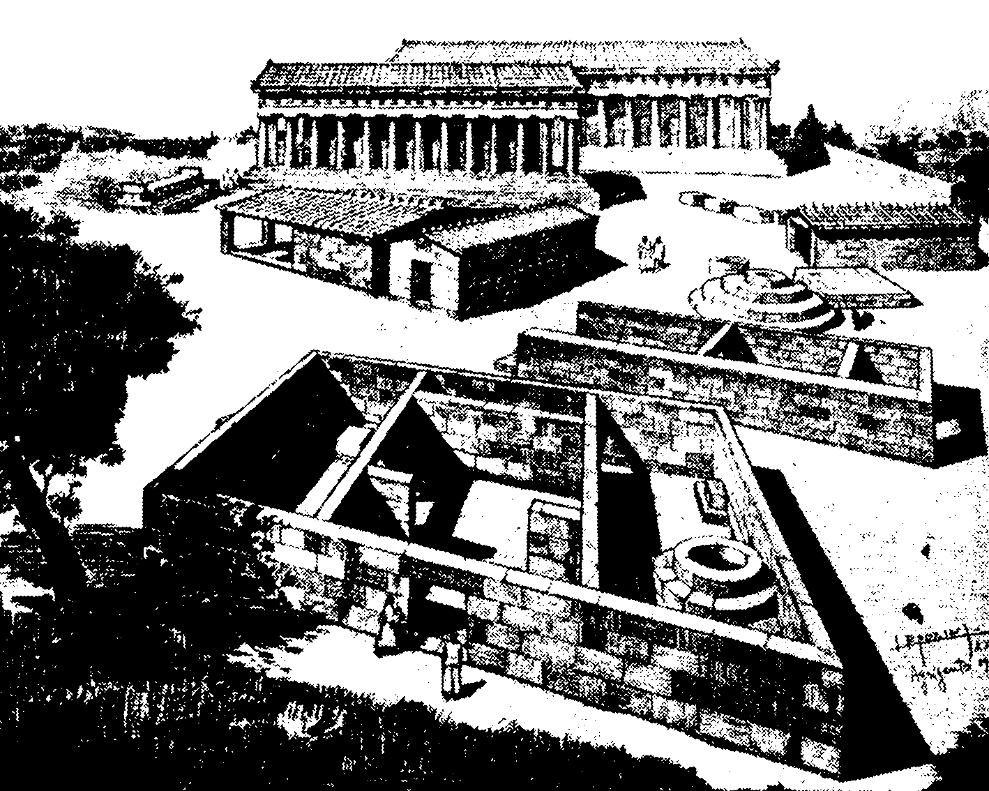 Rekonstruktion des Bezirks der chtonischen Gottheiten von Agrigent